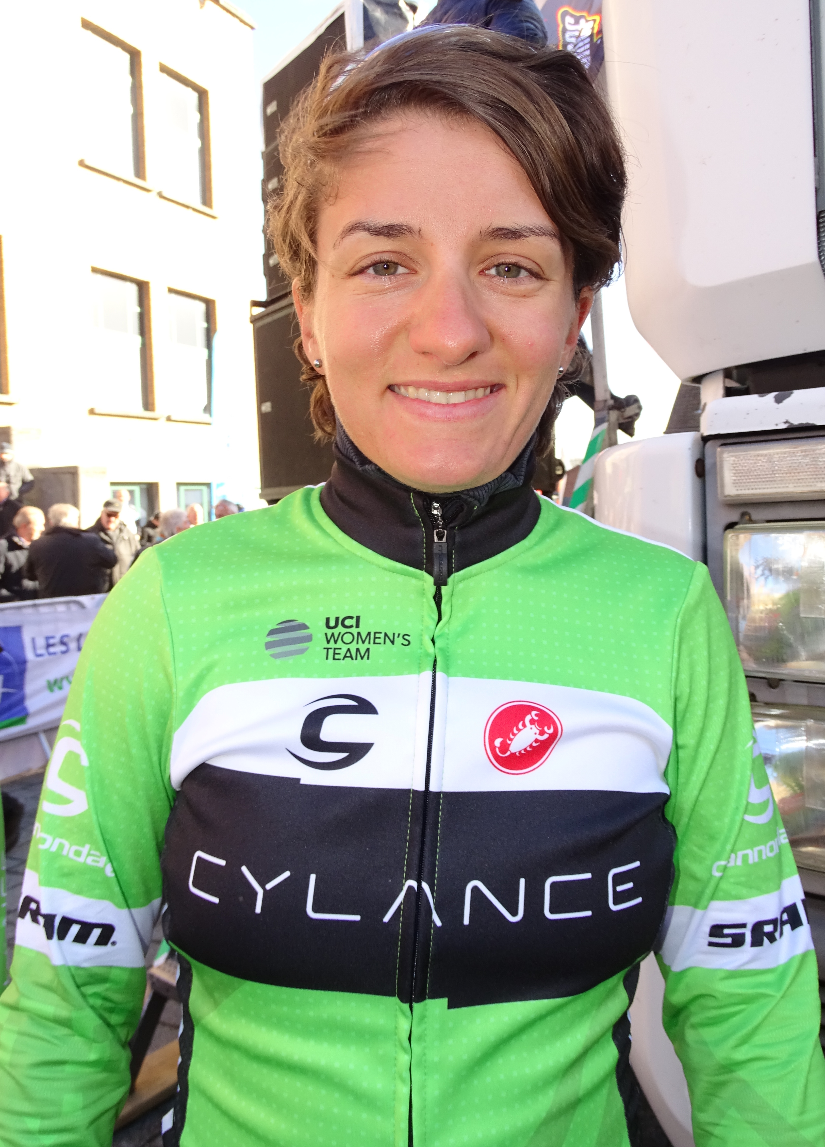 Reportage réalisé le mercredi 2 mars à l'occasion du départ du Samyn des Dames 2016 et du Samyn 2016 à Quaregnon, Belgique.